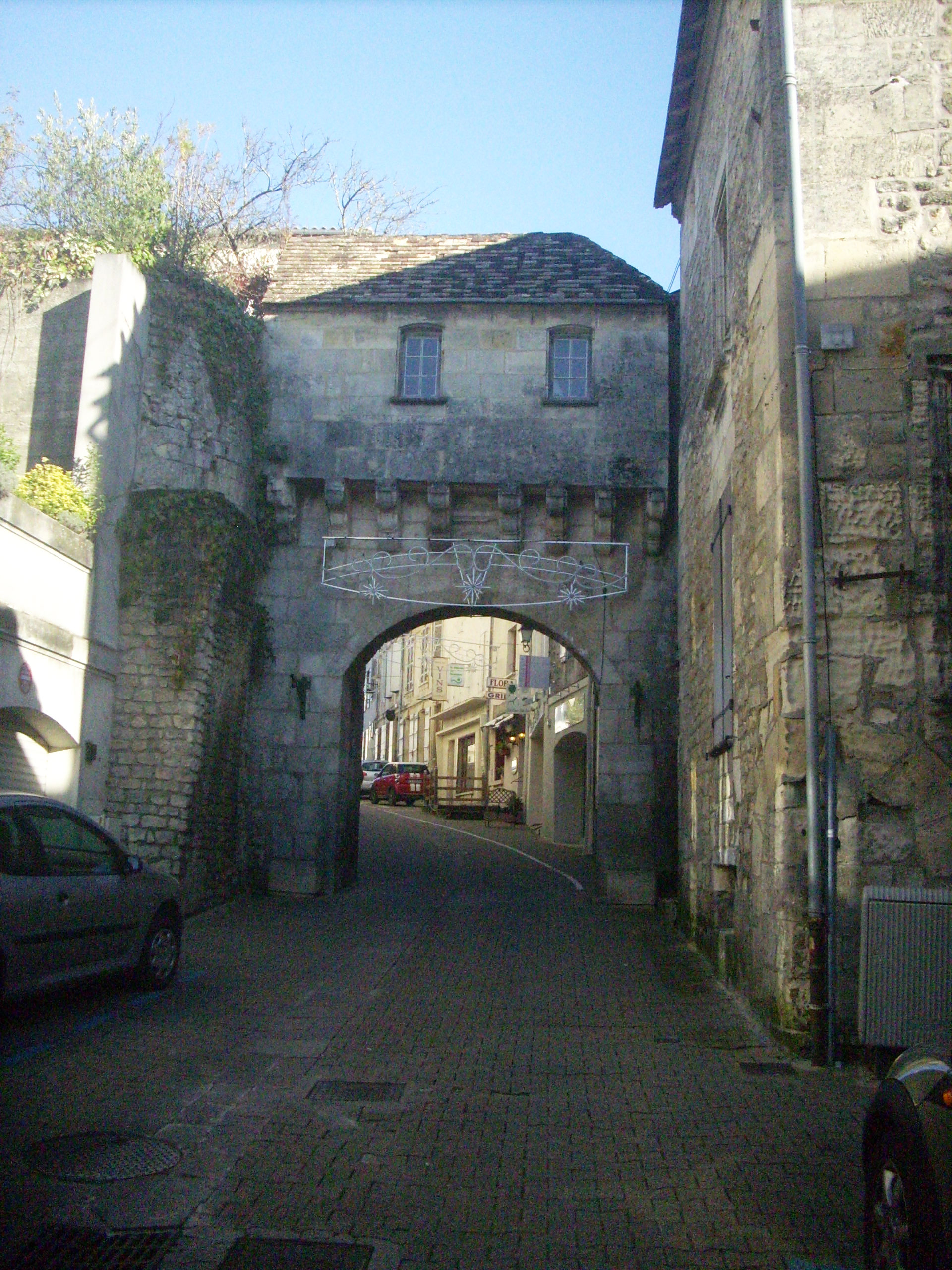 porte de la vieille ville de Jonzac